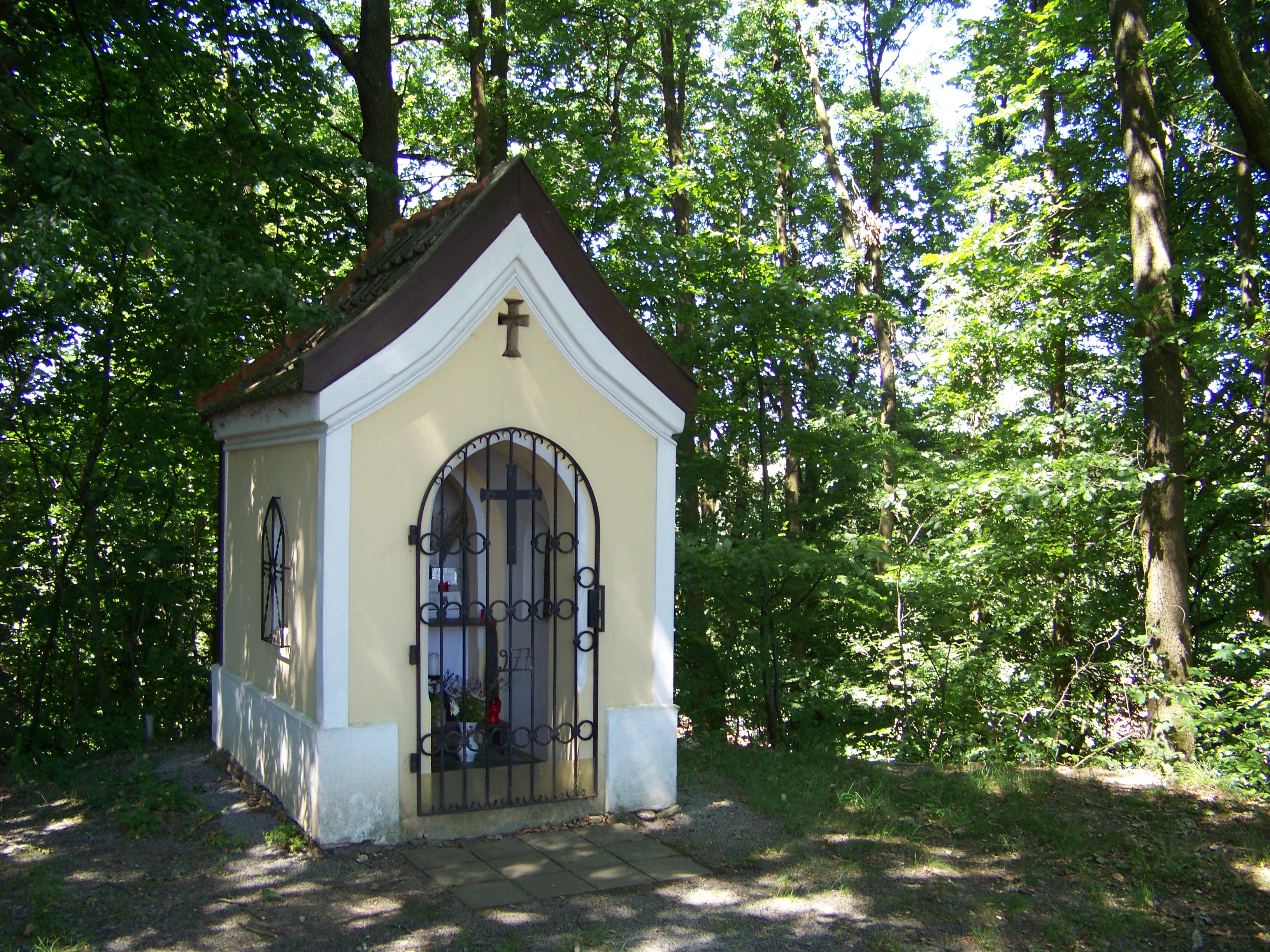 Pfarrkirchen, Reichenberg. Wegkapelle, kleiner Satteldachbau auf dem Burgstall, 18./19. Jahrhundert